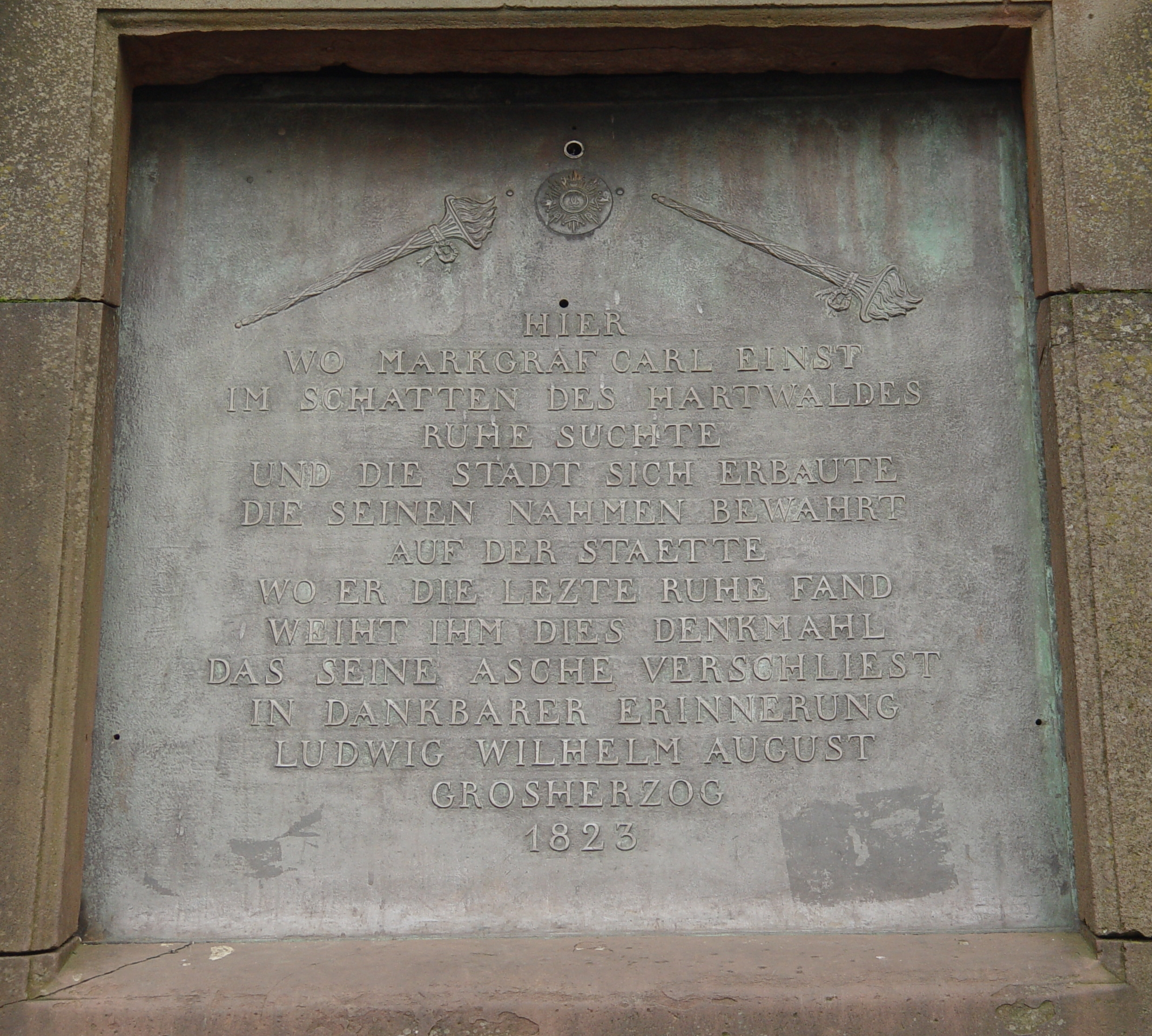 Die Tafel der Pyramide auf dem Karlsruher Marktplatz